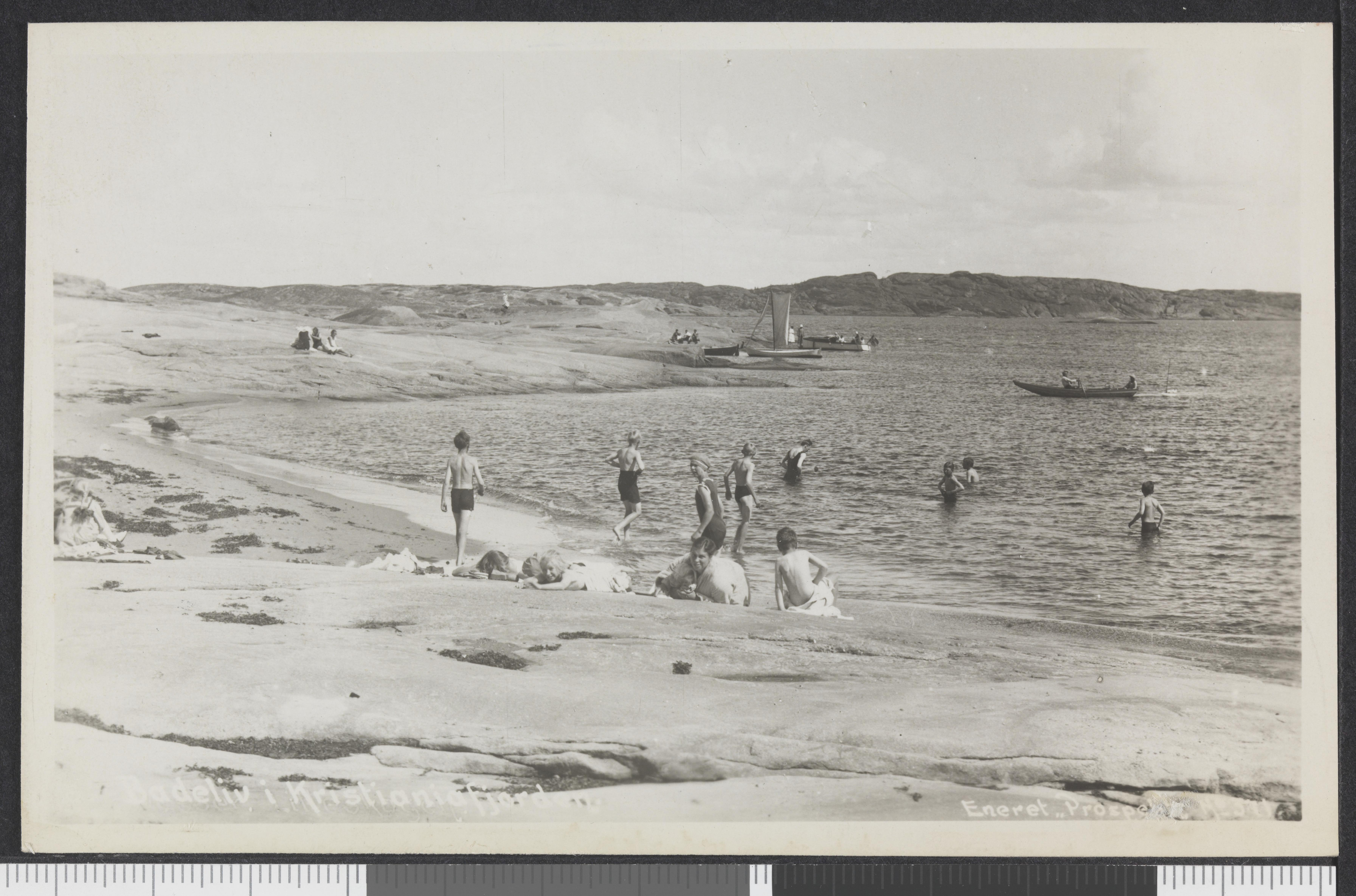 Bildet er hentet fra Nasjonalbibliotekets bildesamling Oslofjorden, Oslo, Oslo. Bildet viser ikke Oslo, men stranda Lilleskagen i Tjøme kommune i Vestfold.